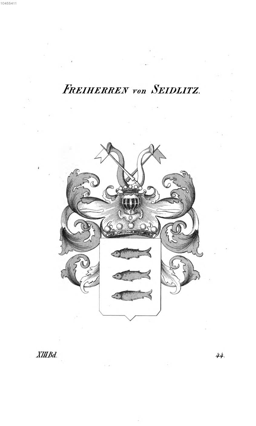 Wappen Seidlitz - Tyroff AT.jpg